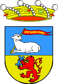 Escudo de Alcalalí, en Alicante (España)